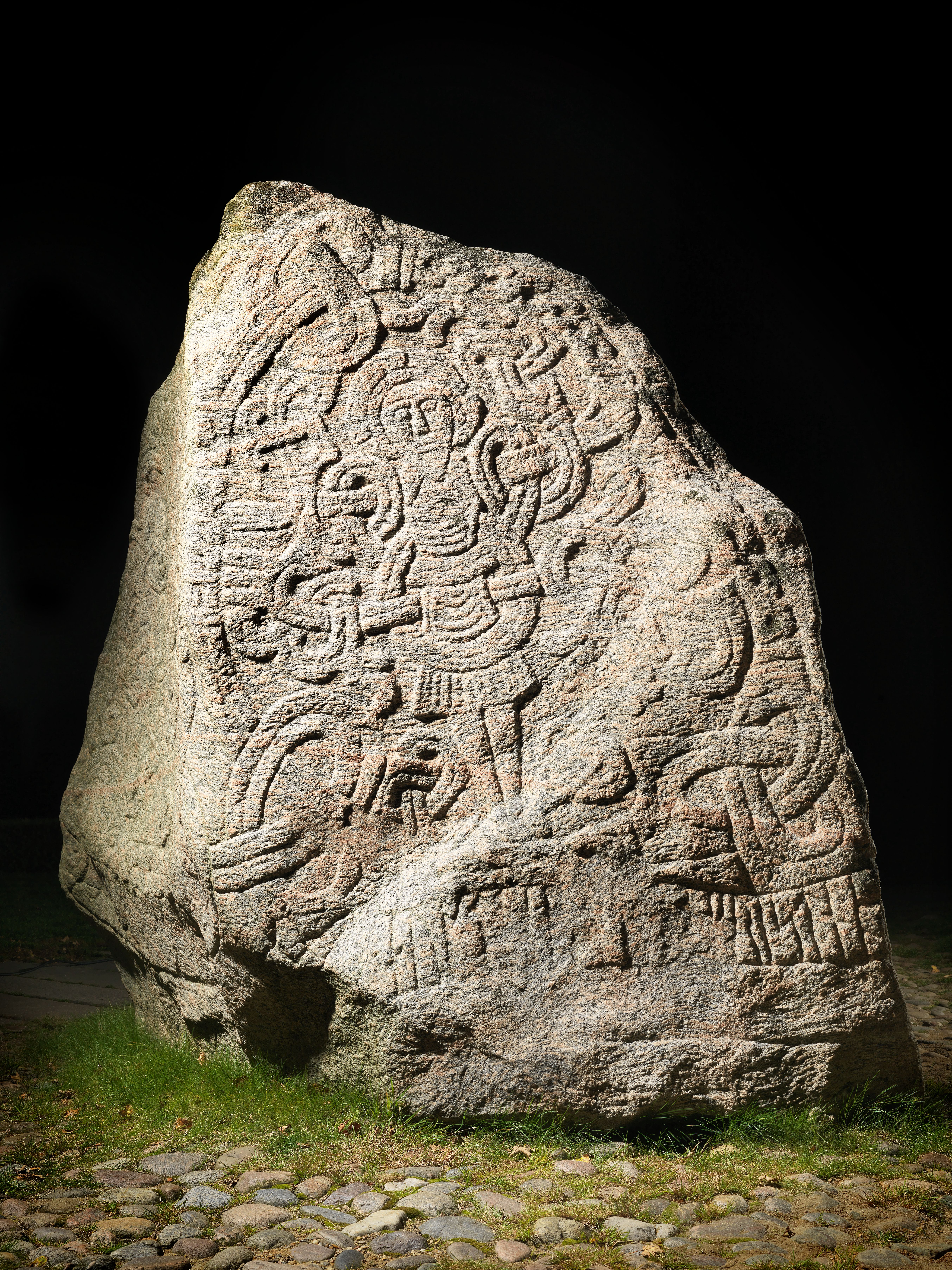 Foto af Roberto Fortuna 2012